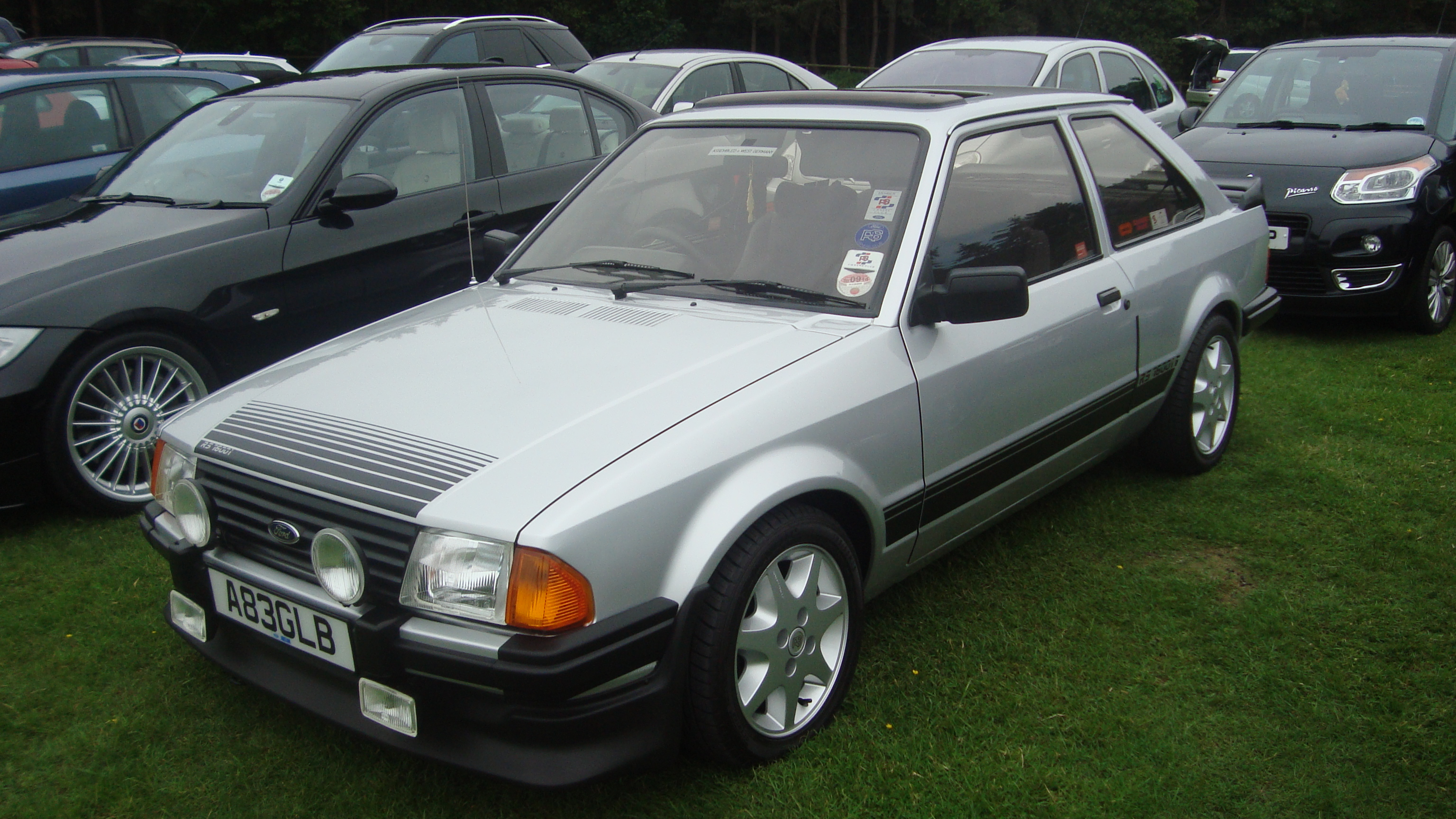 1983 Ford Escort RS1600i